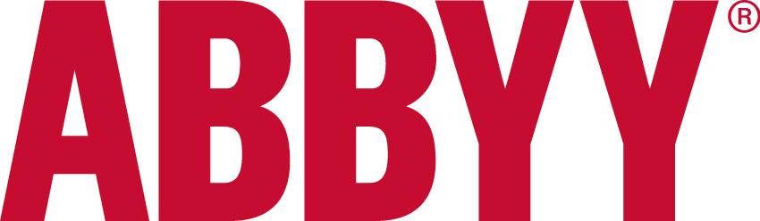 Логотип компании ABBYY